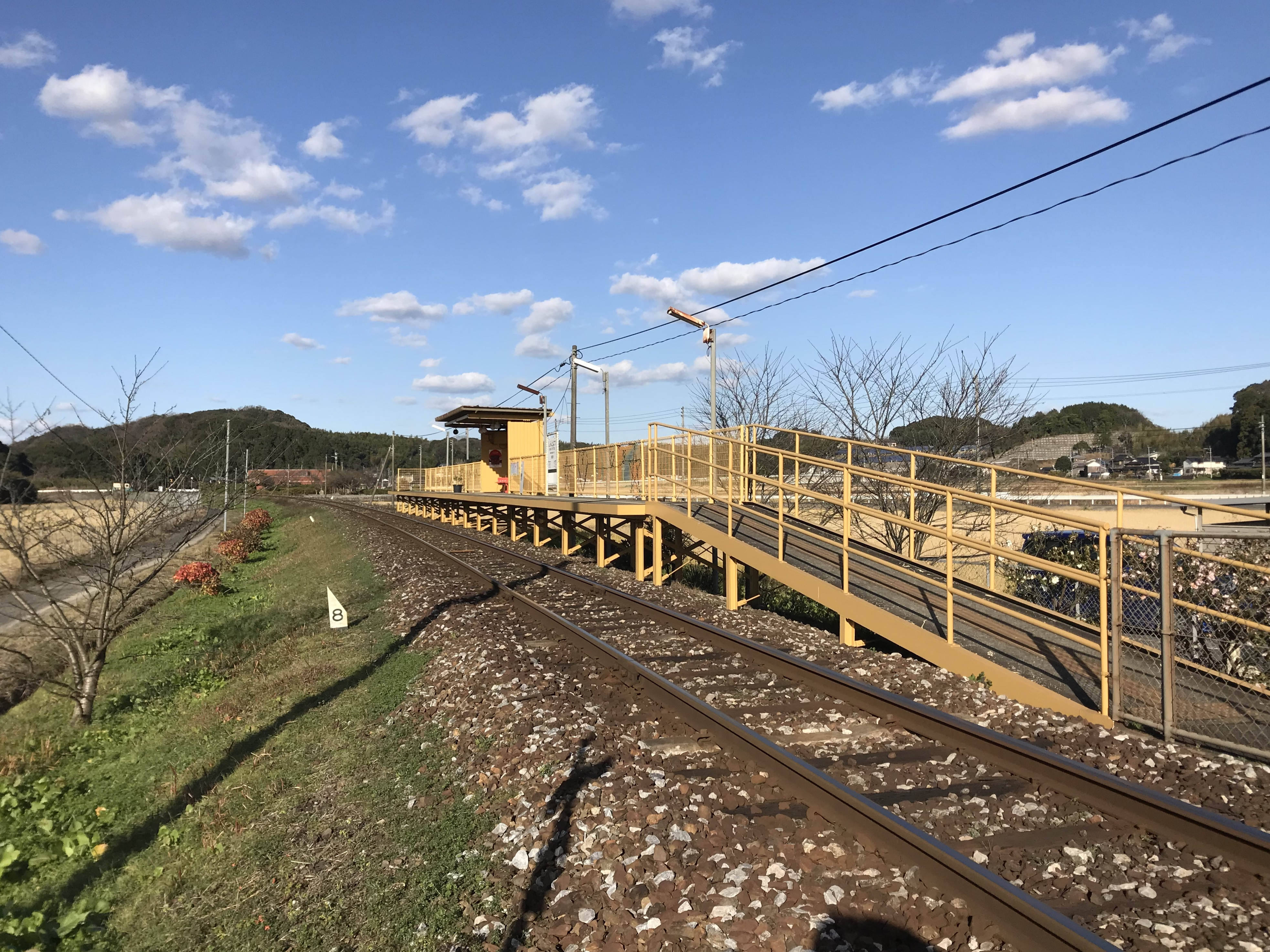 新豊津駅のホーム(奥は豊津方面)